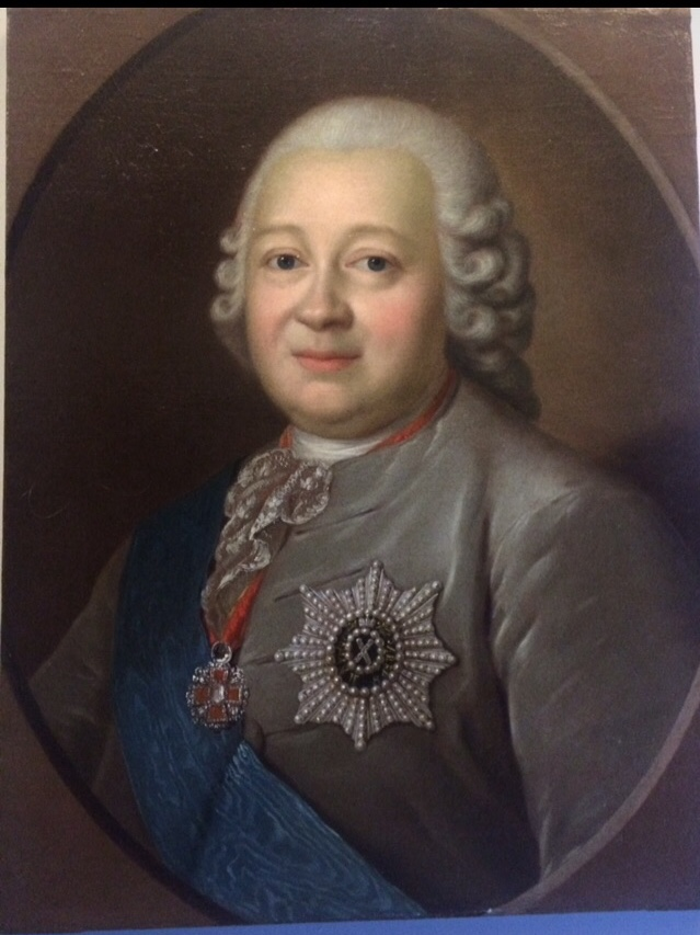 Граф Никита Иванович Панин/Count Nikita Ivanovich Panin. Холст масло, 61 на 47 см/ oil on canvas 61 by 47 cm